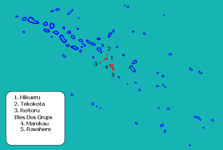 Mapa de localització de la comuna d'Hikueru a l'arxipèlag Tuamotu, Polinèsia Francesa.